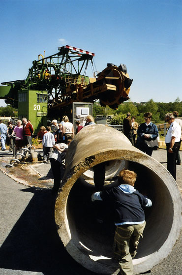 Exponate und Besucher im Themenpark Kohle und Energie, Hessisches Braunkohle Bergbaumuseum, Borken (Hessen)